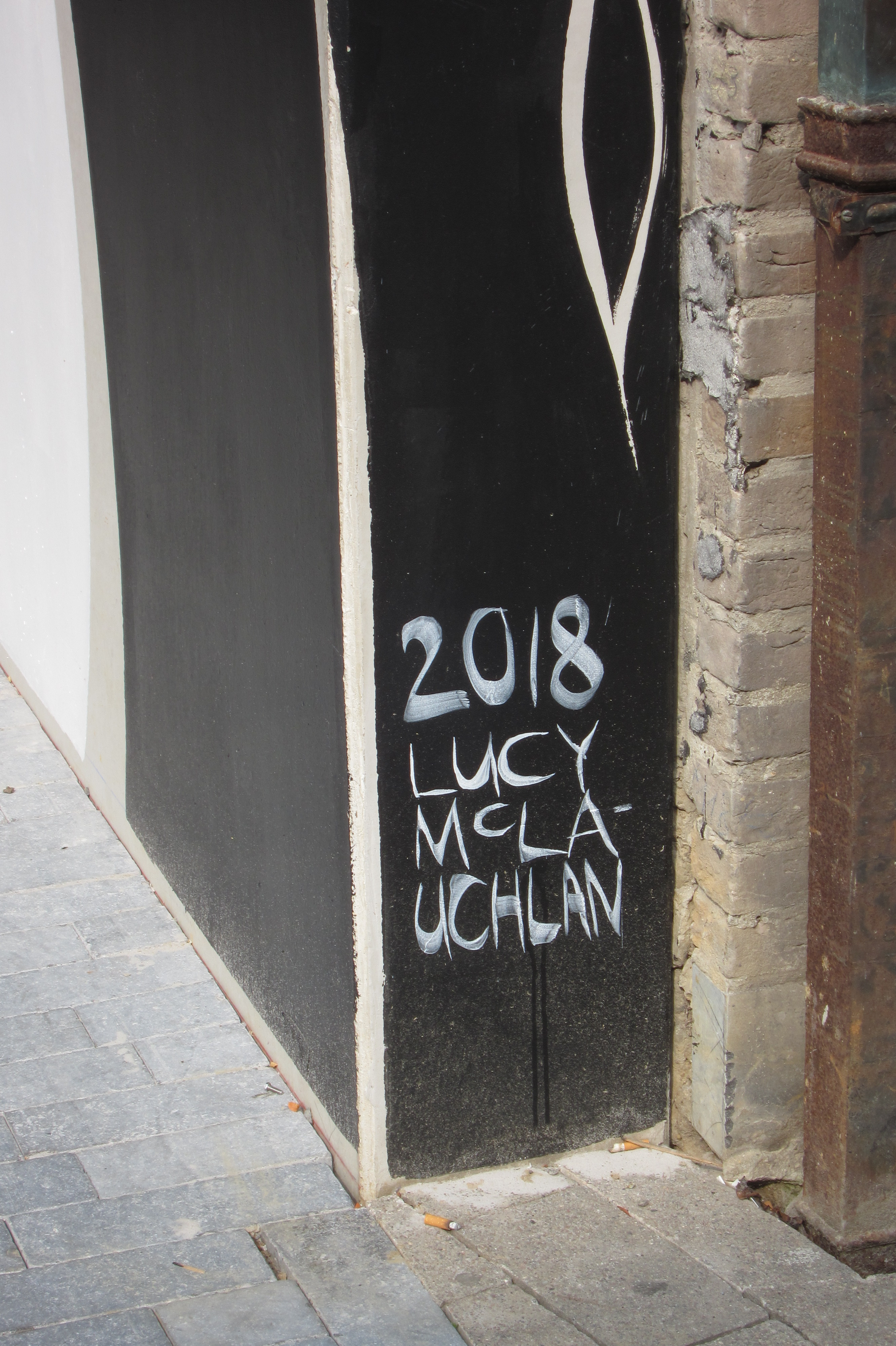 Detail wandschildering van Lucy McLaughlan aan het stadkantoor 't Scheep van Hasselt, België